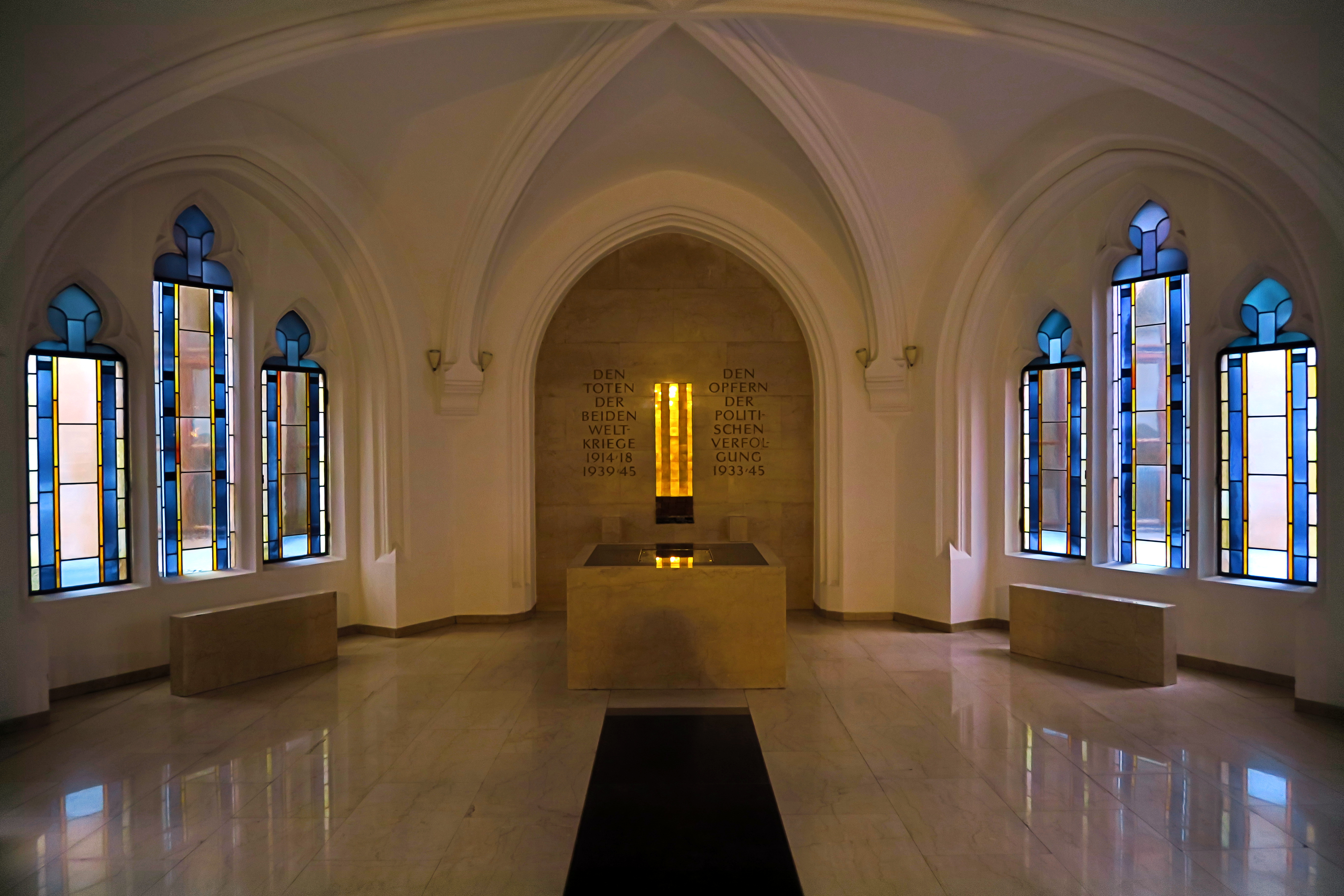 Deutschland, Bayern, München, Neues Rathaus, Gedenkraum im 1. Stockwerk im Südflügel zum Innenhof gerichtet